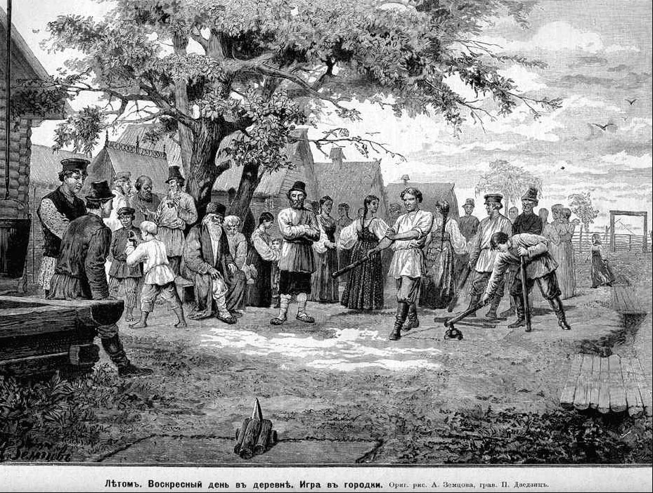 Летом. Воскресный день в деревне. Игра в городки. Ориг. рис. А. Земцова, грав. П. Даеданц